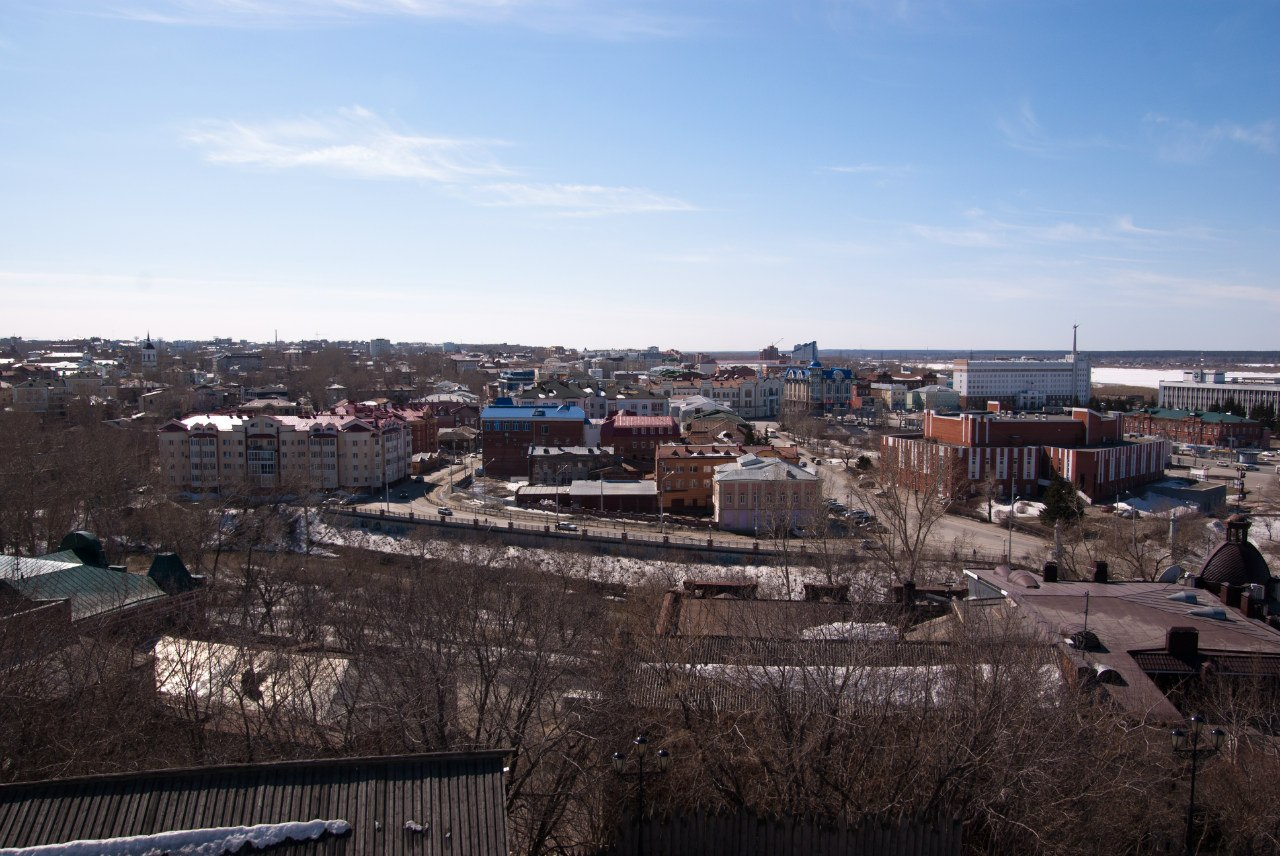 Tomsk, view from the fire-observation tower